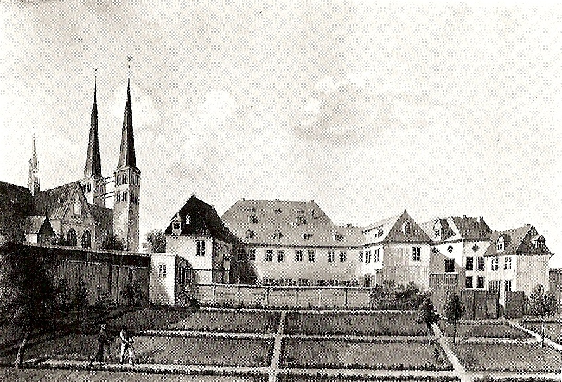 Der Bischofshof am Lübecker Dom, Gouache vor 1819, dem Jahr des Abbruchs des von Bischof Heinrich II. Bocholt erbauten und 1439/49 erweitereten Hofes